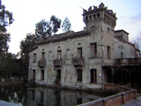 Vista frontale del Palazzo Liberty